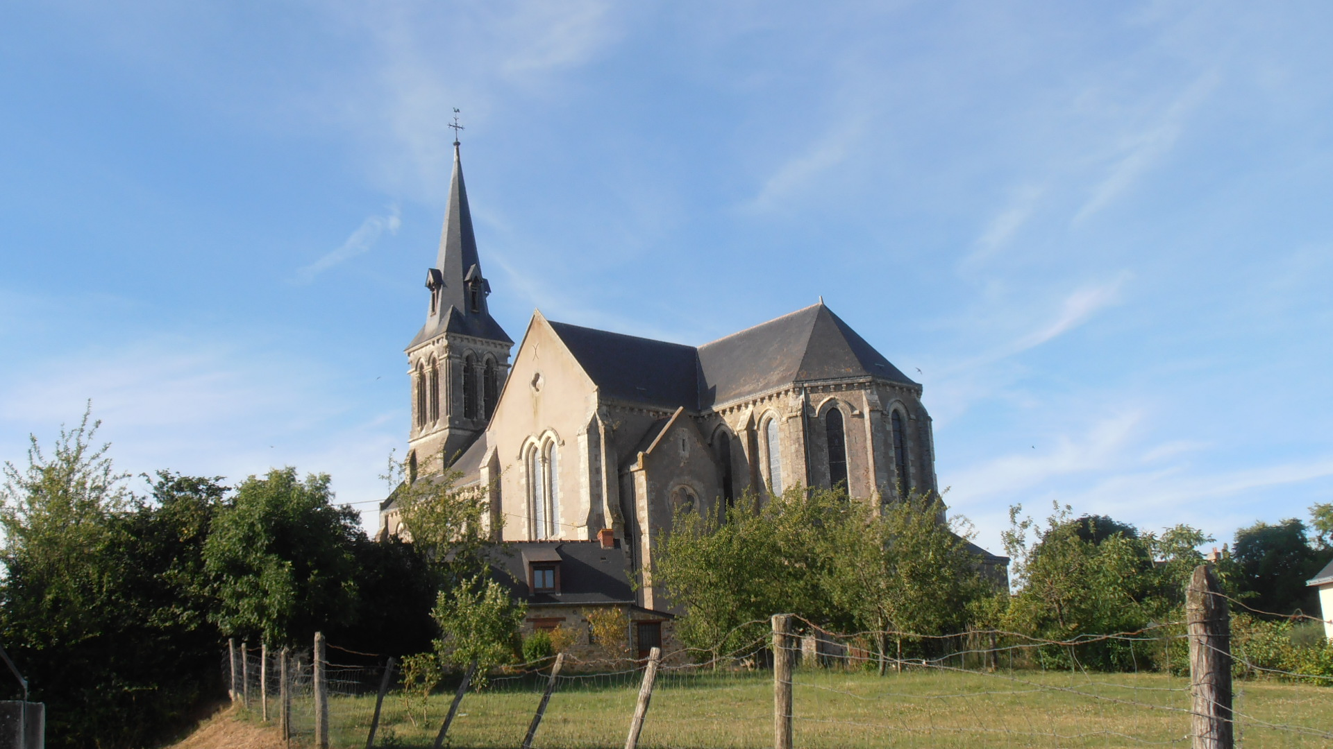 L'église de Villemoisan